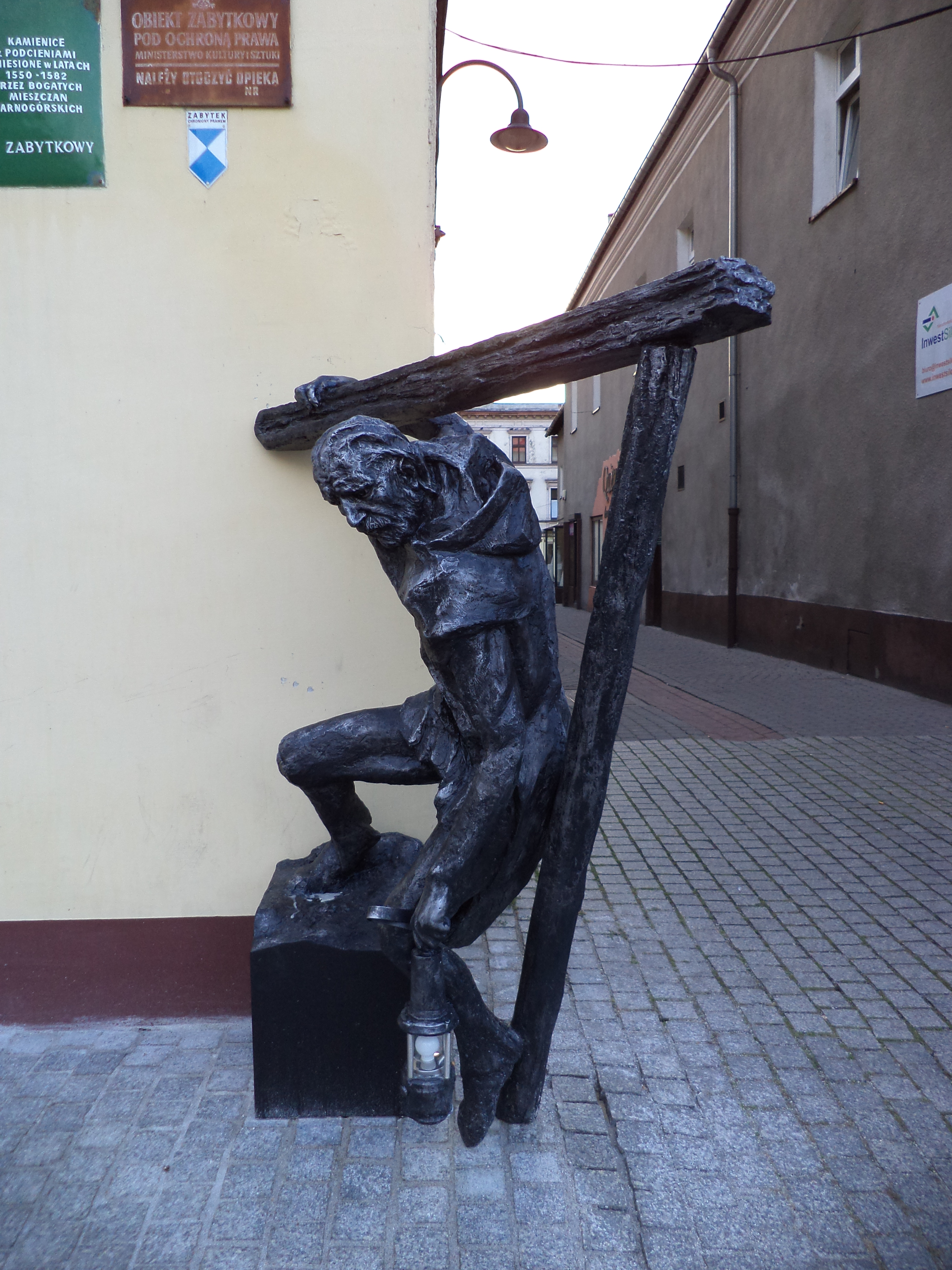 Pomnik Gwarka na Rynku w Tarnowskich Górach